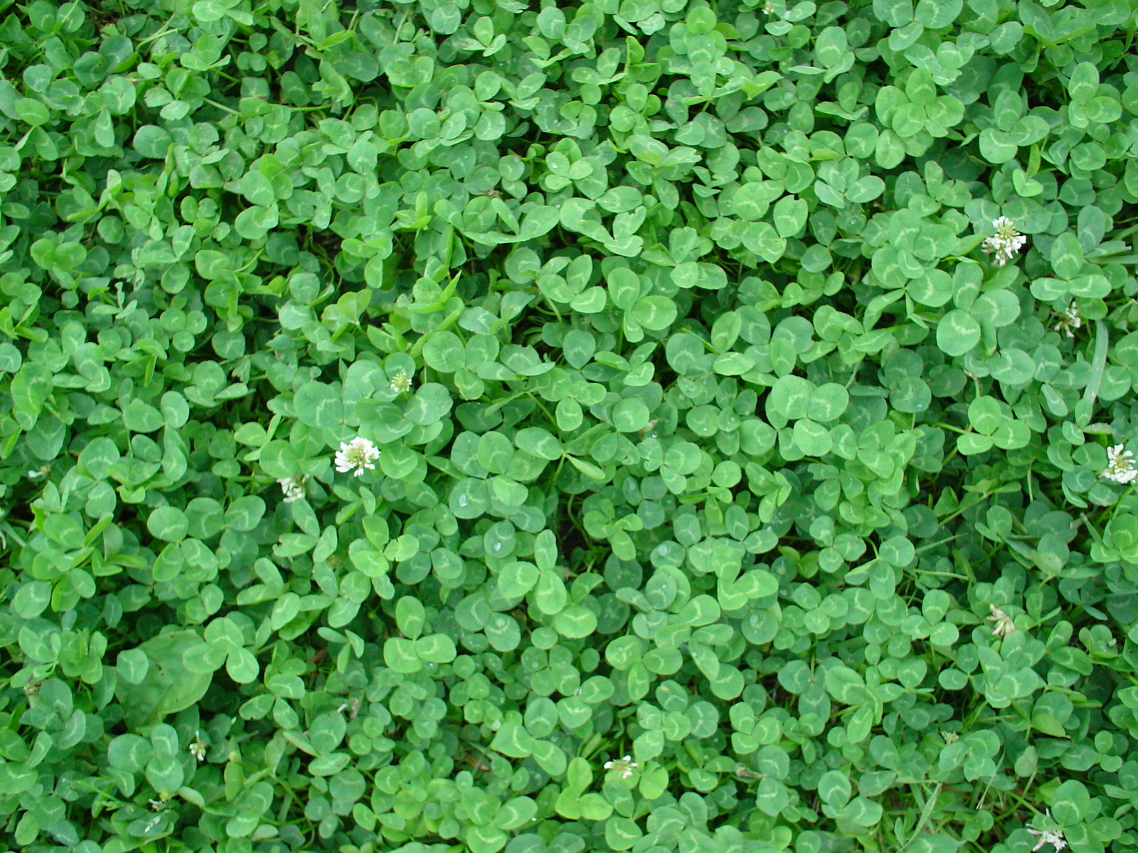 Trifolium repens